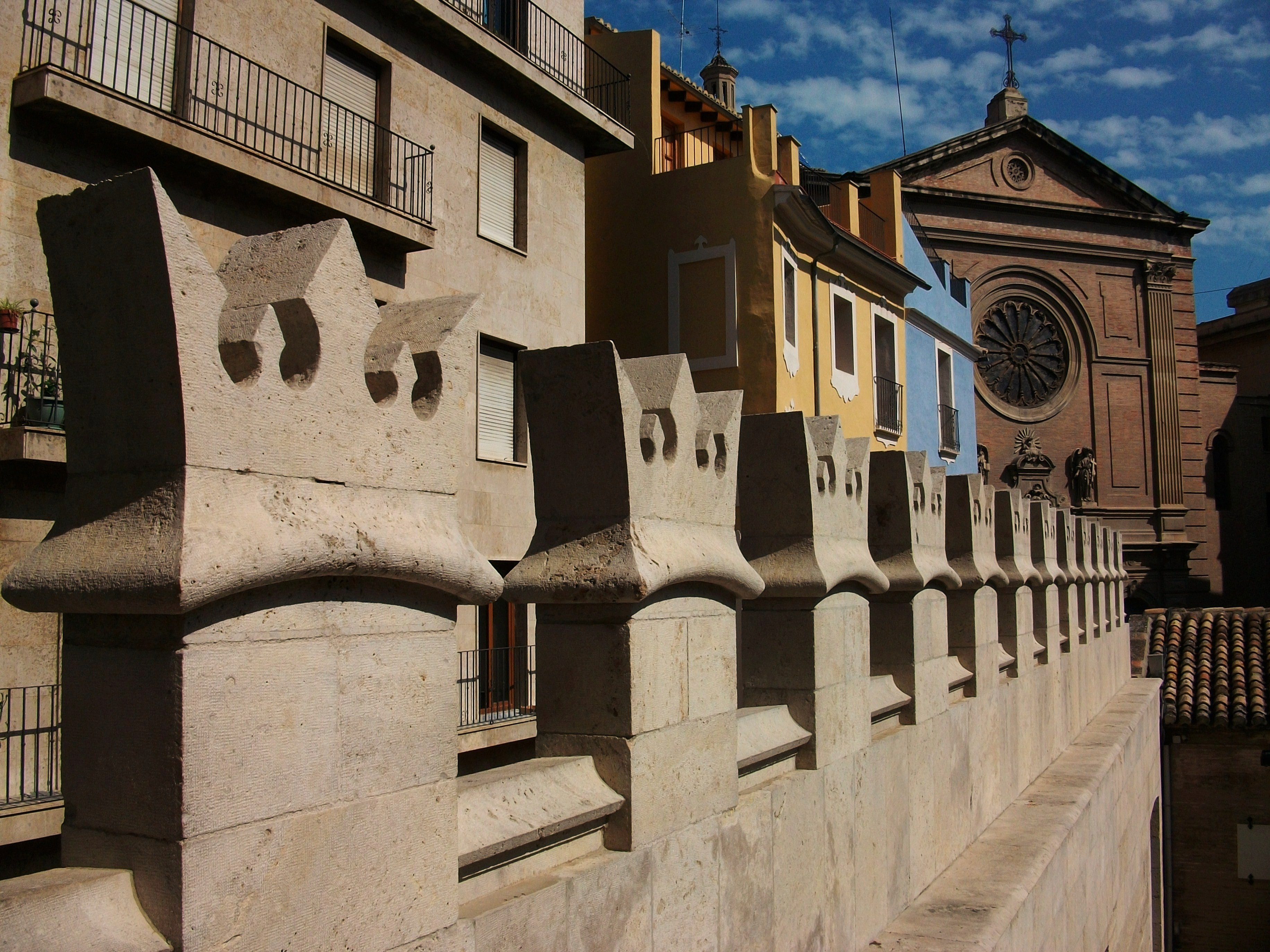 Merlets coronats de la Llotja de València o de la Seda. Al fons es veu la façana de l'església de la Companyia.